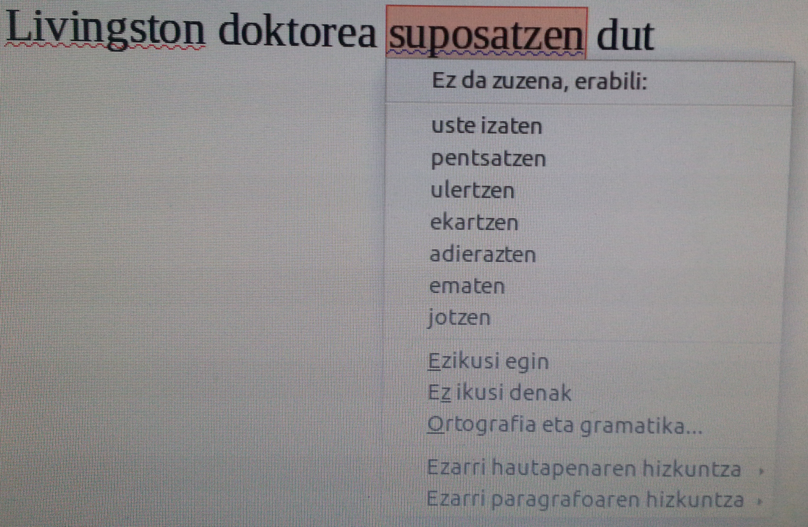 Hobelex zuzentzaile lexikoa erabiltzerakoan, ezagunak ez diren hitzak gorriz azpimarratuak agertuko dira eta urdinez azpimarratutako hitzei, erabat zuzenak ez direlakoan, beste aukera batzuk eskainiko zaizkie.